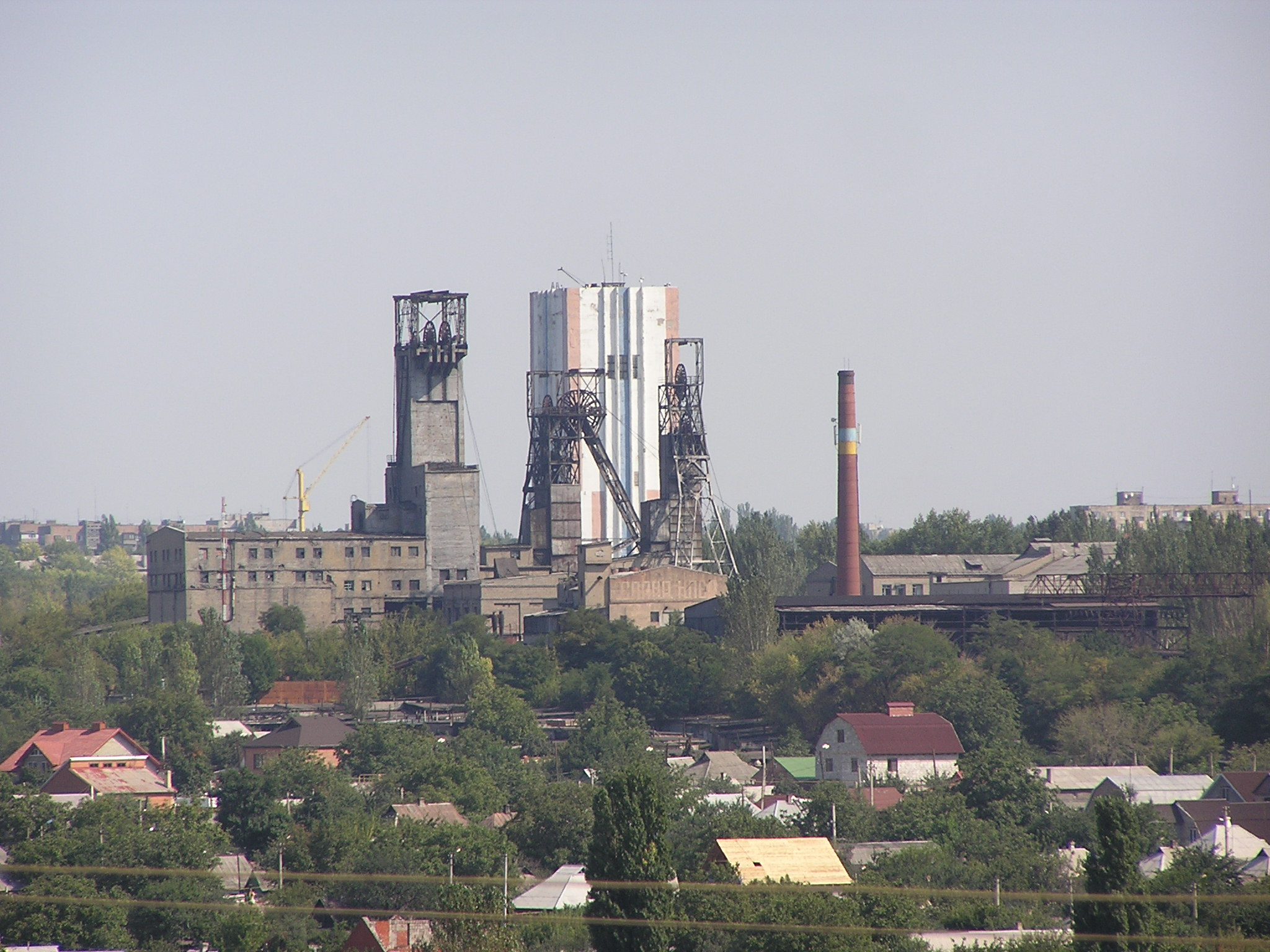 Киевский район Донецка.